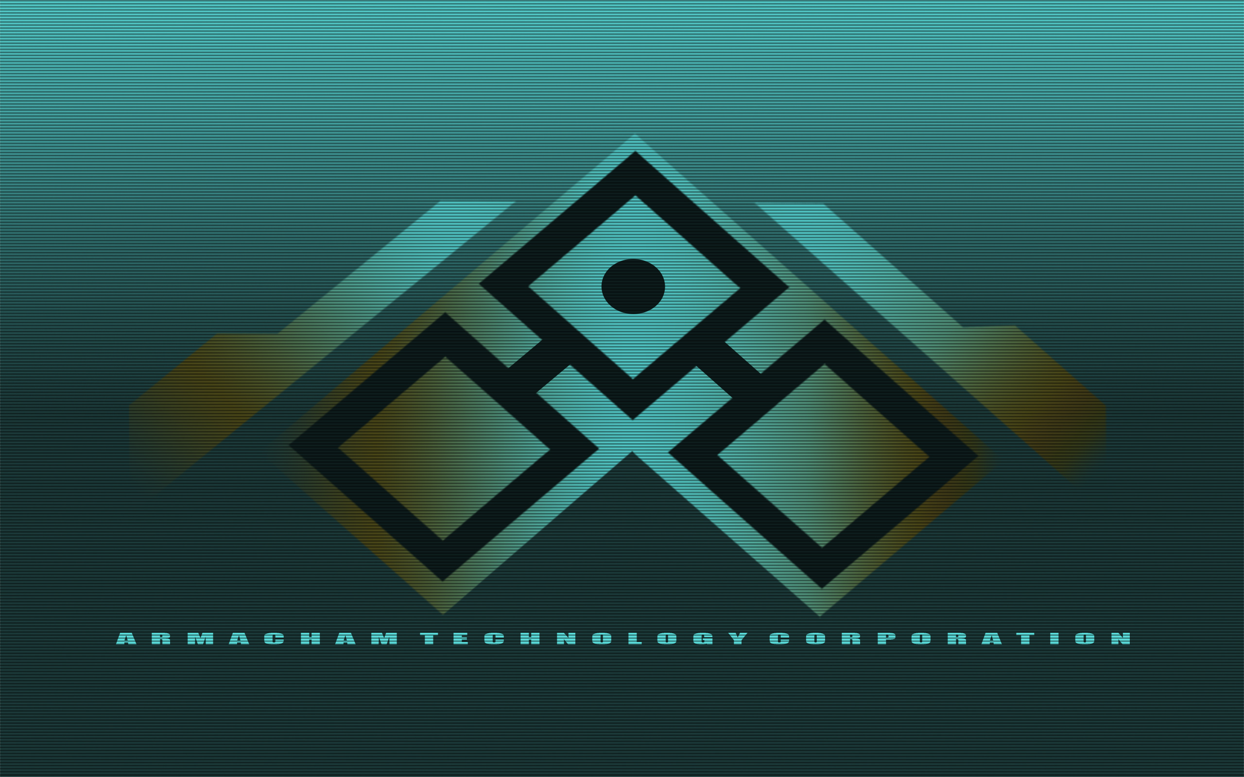 Logo della Armacham Technology Corporation, corporazione fittizia della saga di videogiochi F.E.A.R.